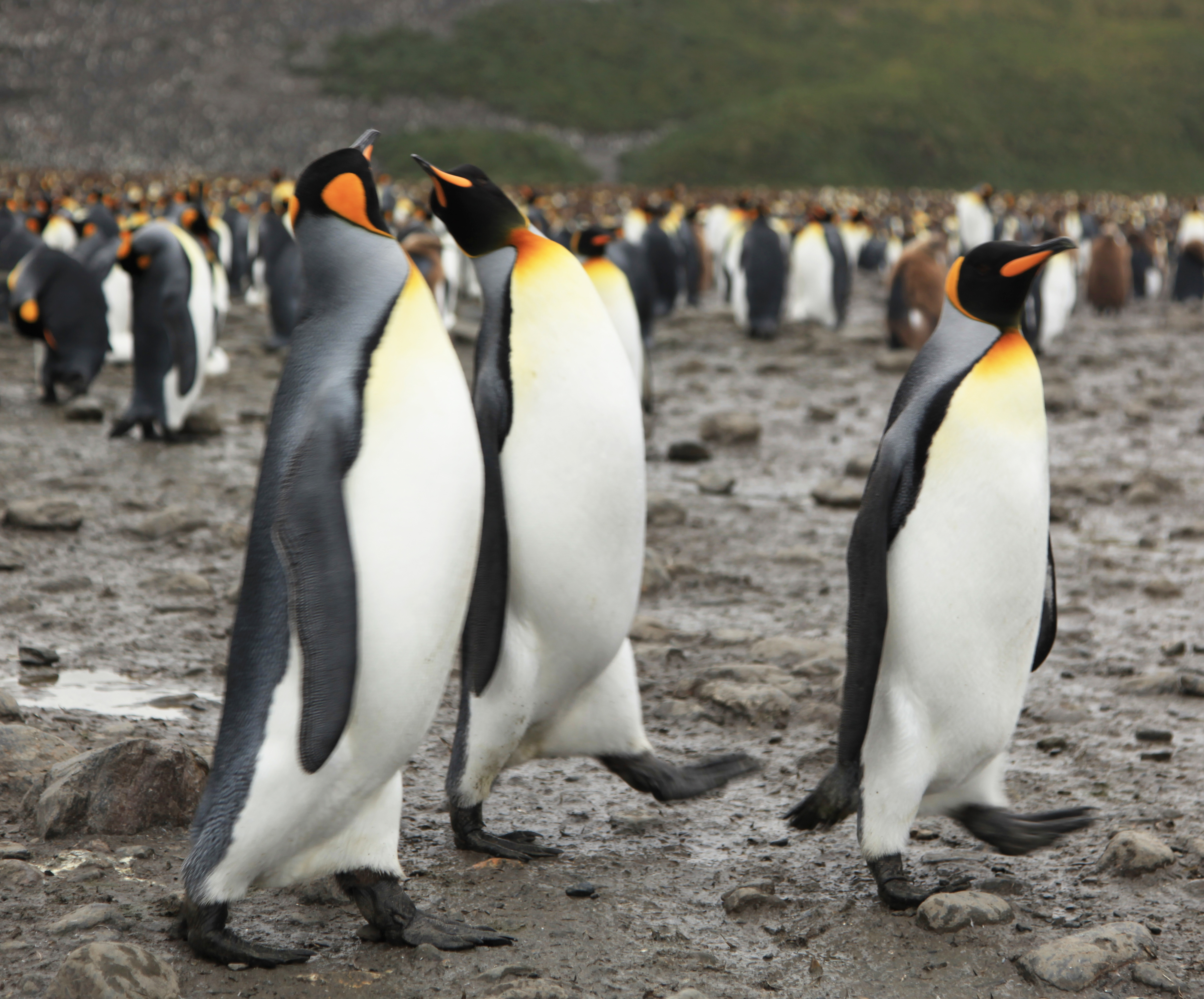 King Penguins at Salisbury Plain